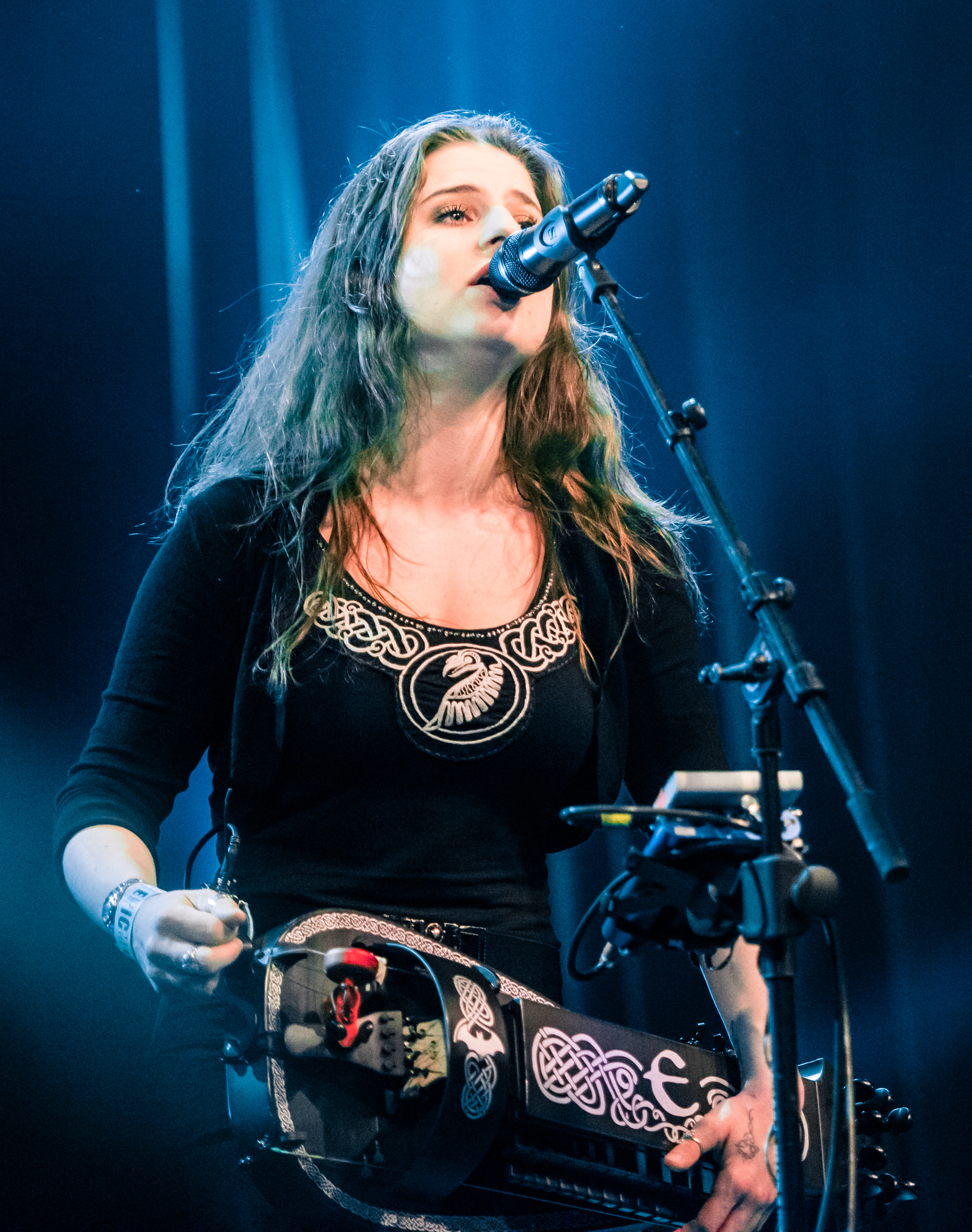 'Eluveitie - Epic Metal Fest - Eindhoven' - Anna Murphy